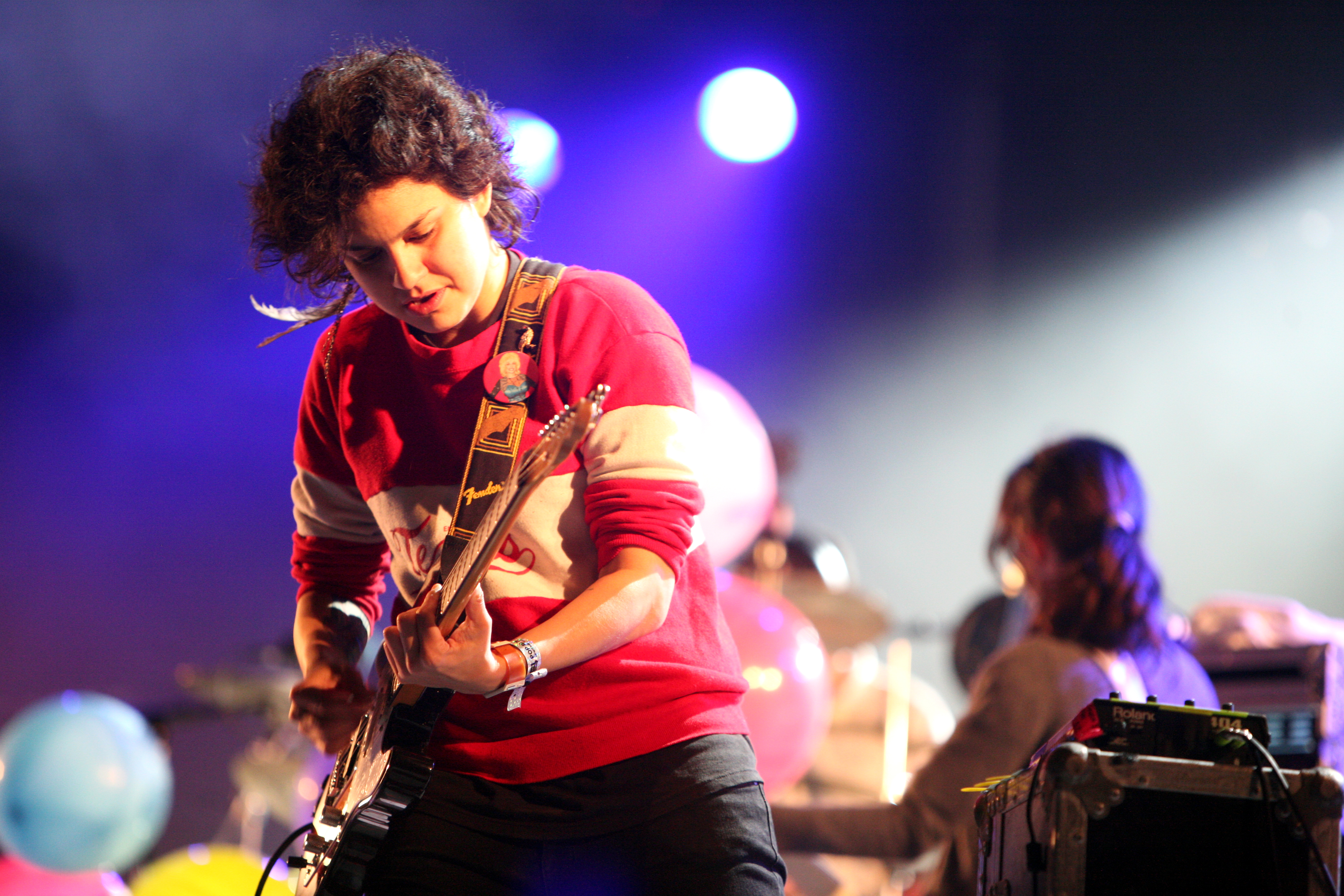 Cansei de Ser Sexy (Luiza Sá) at Rock en Seine Route du Rock, August 2007